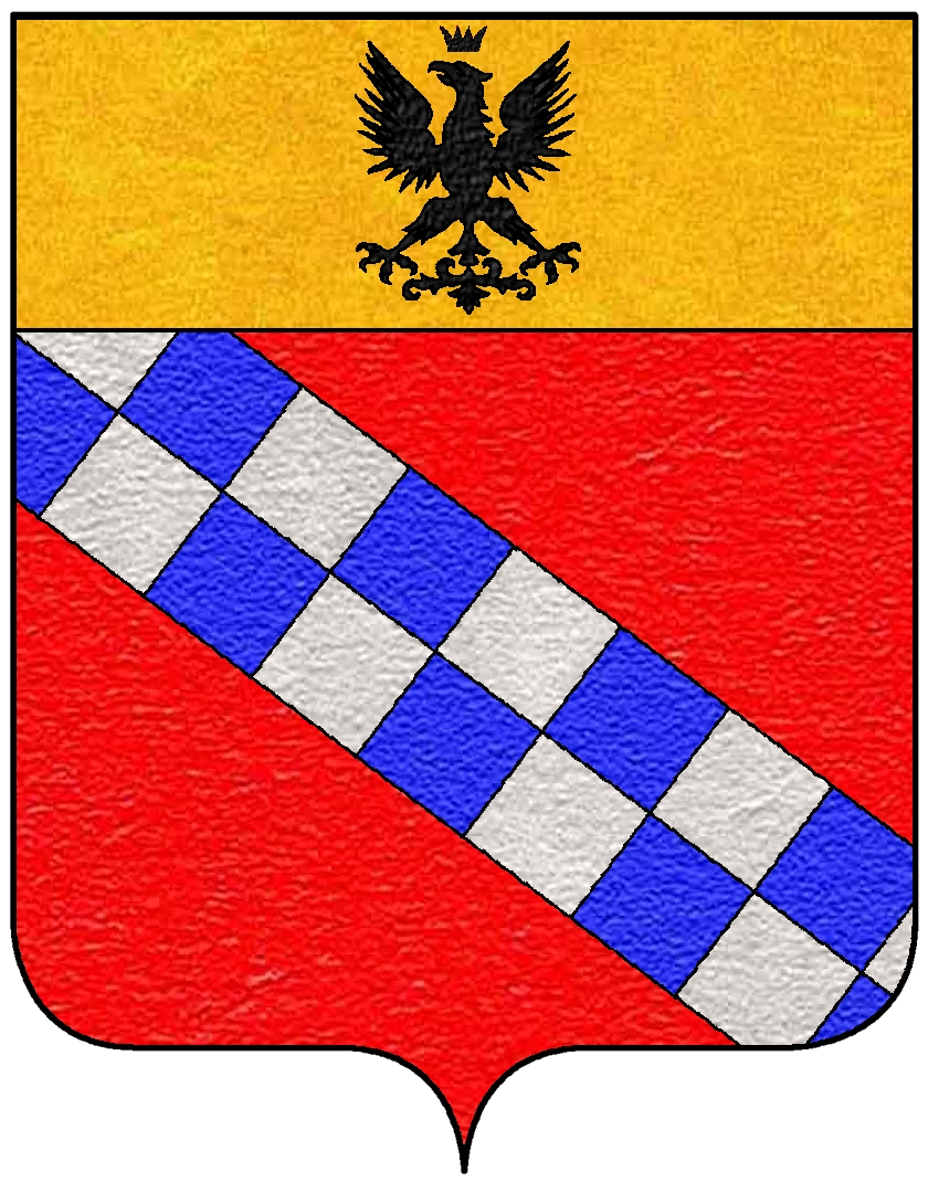 Stemma della famiglia Lampugnani